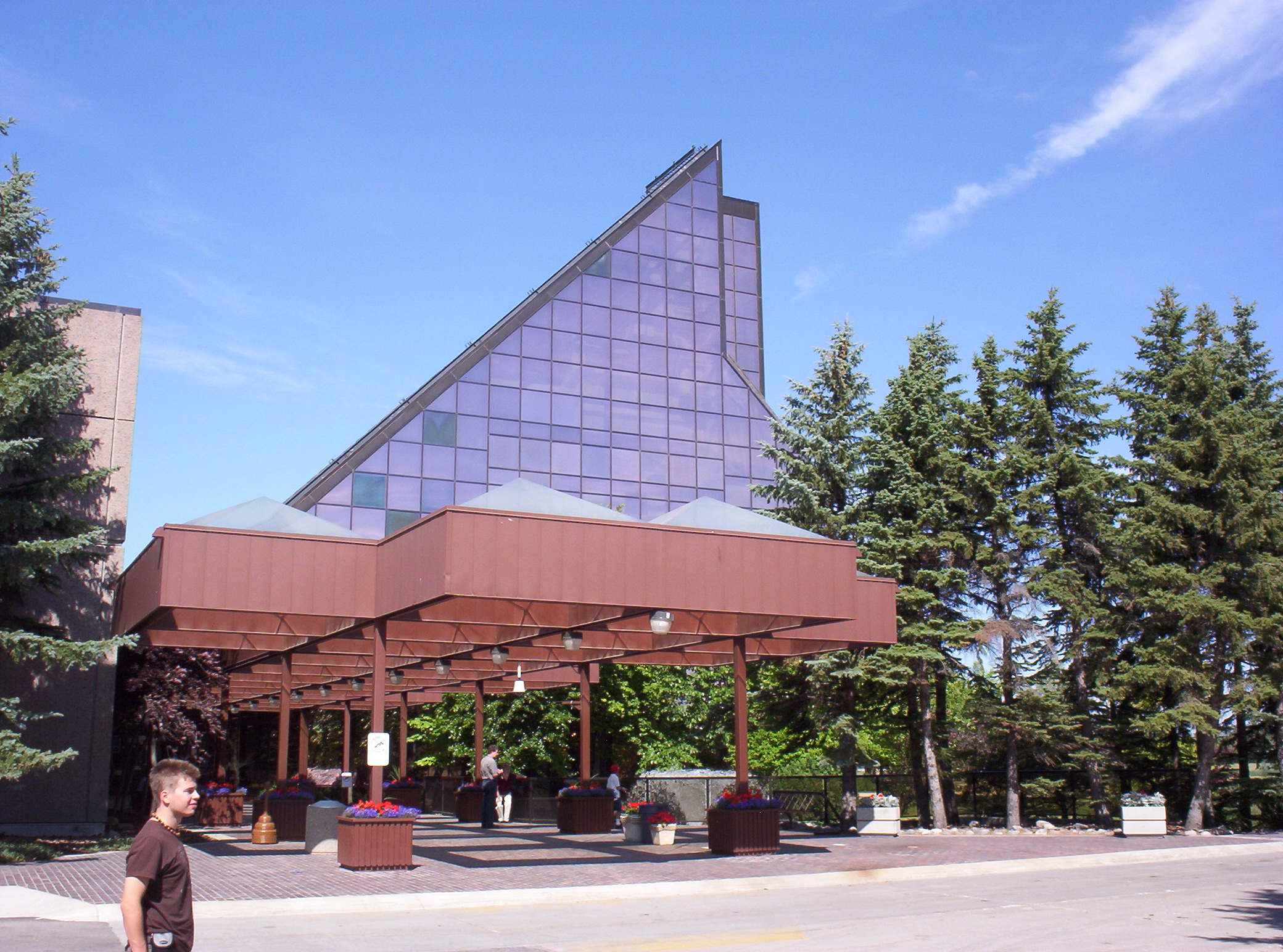 Bâtiment de la Monnaie royale canadienne à Winnipeg (Manitoba, Canada).